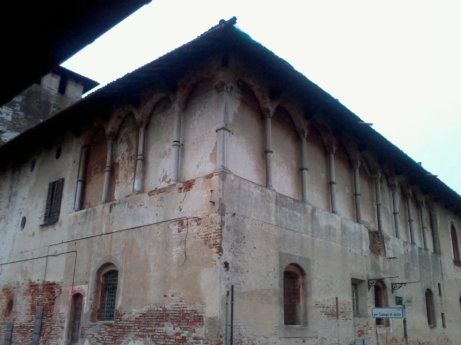 Loggiato del Castello di Cusago (MI) - Italy